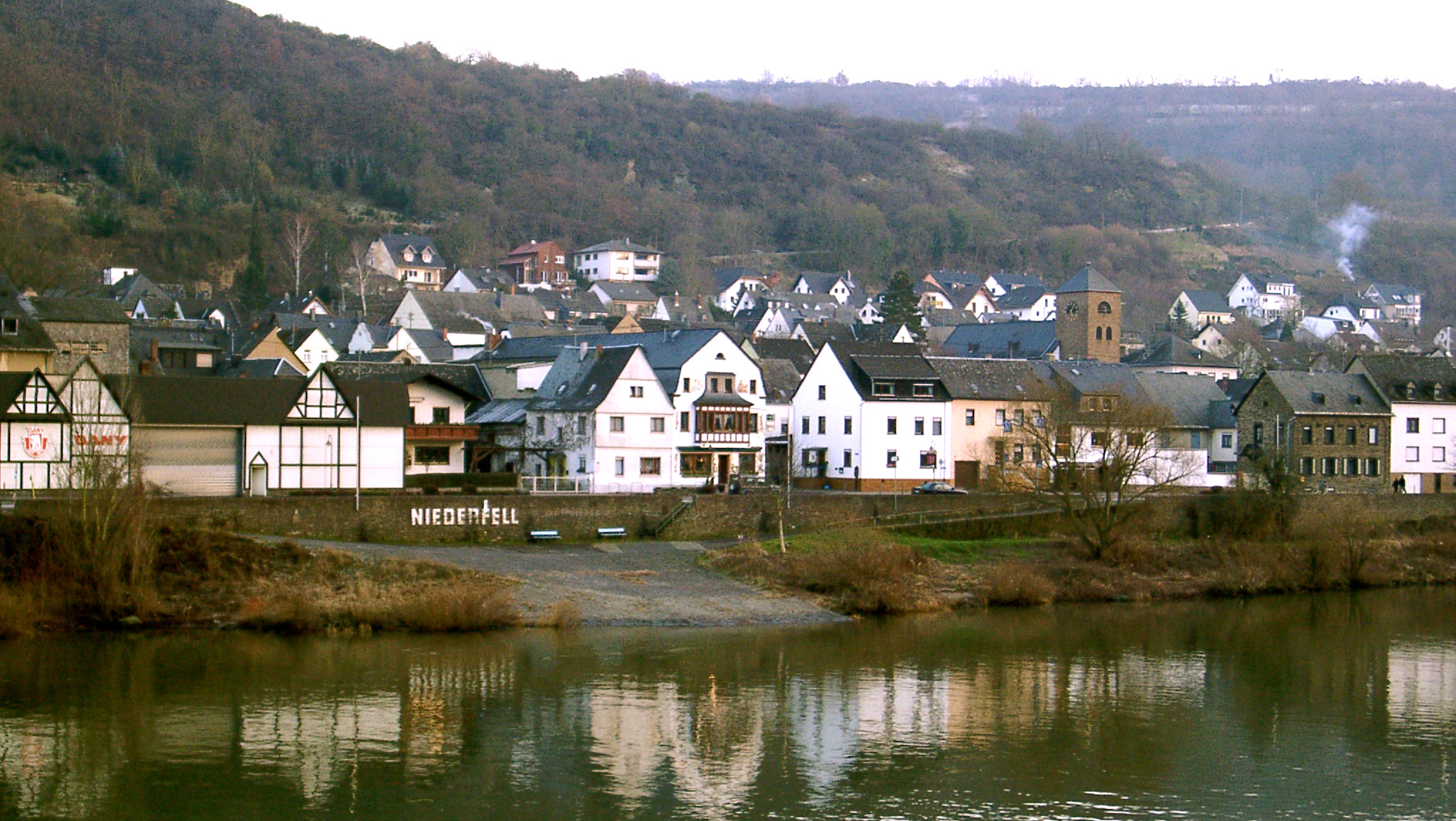 Niederfell (Mosel)